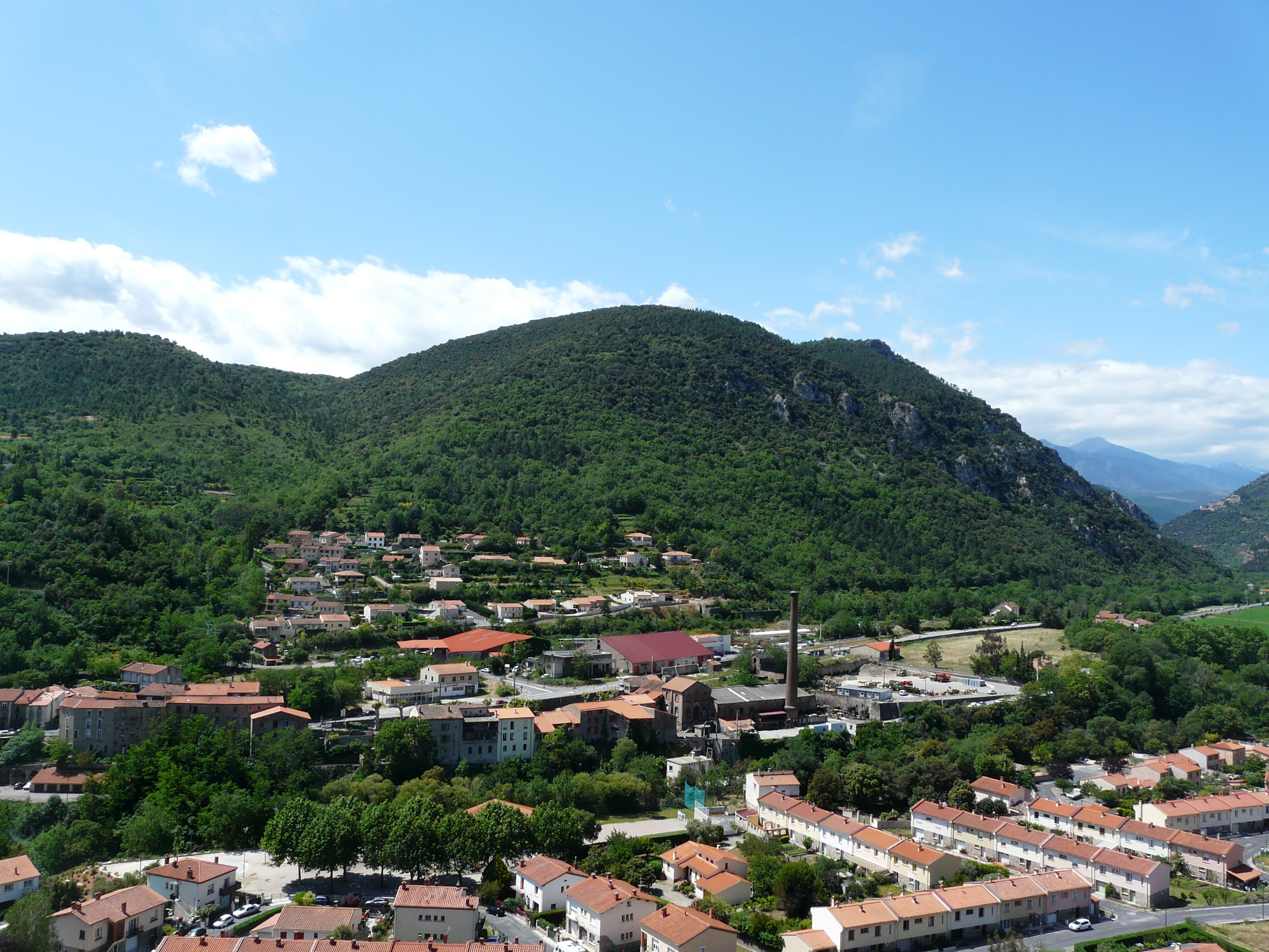 Vista general del sector occidental del poble de Rià, amb el barri de la Ruta General